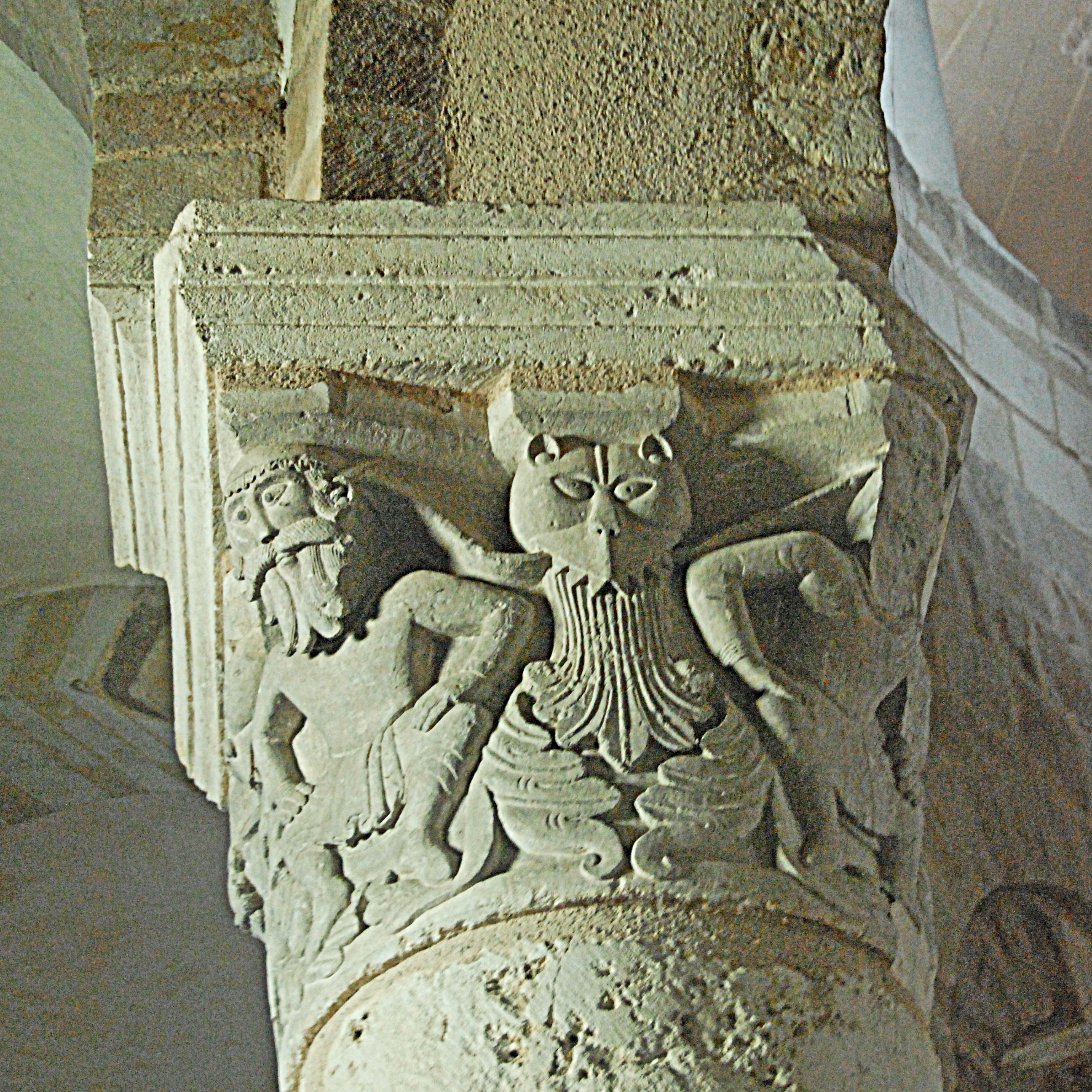 Neuvy_St.-Sépulcre, Rotunde, Kapitell, Monster, bärtige Männer